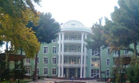 Санаторий "Бахористон" в Согдийской области (Таджикистан) Тоҷикӣ: Осоишгохи "Бахористон" дар вилояти Суғд